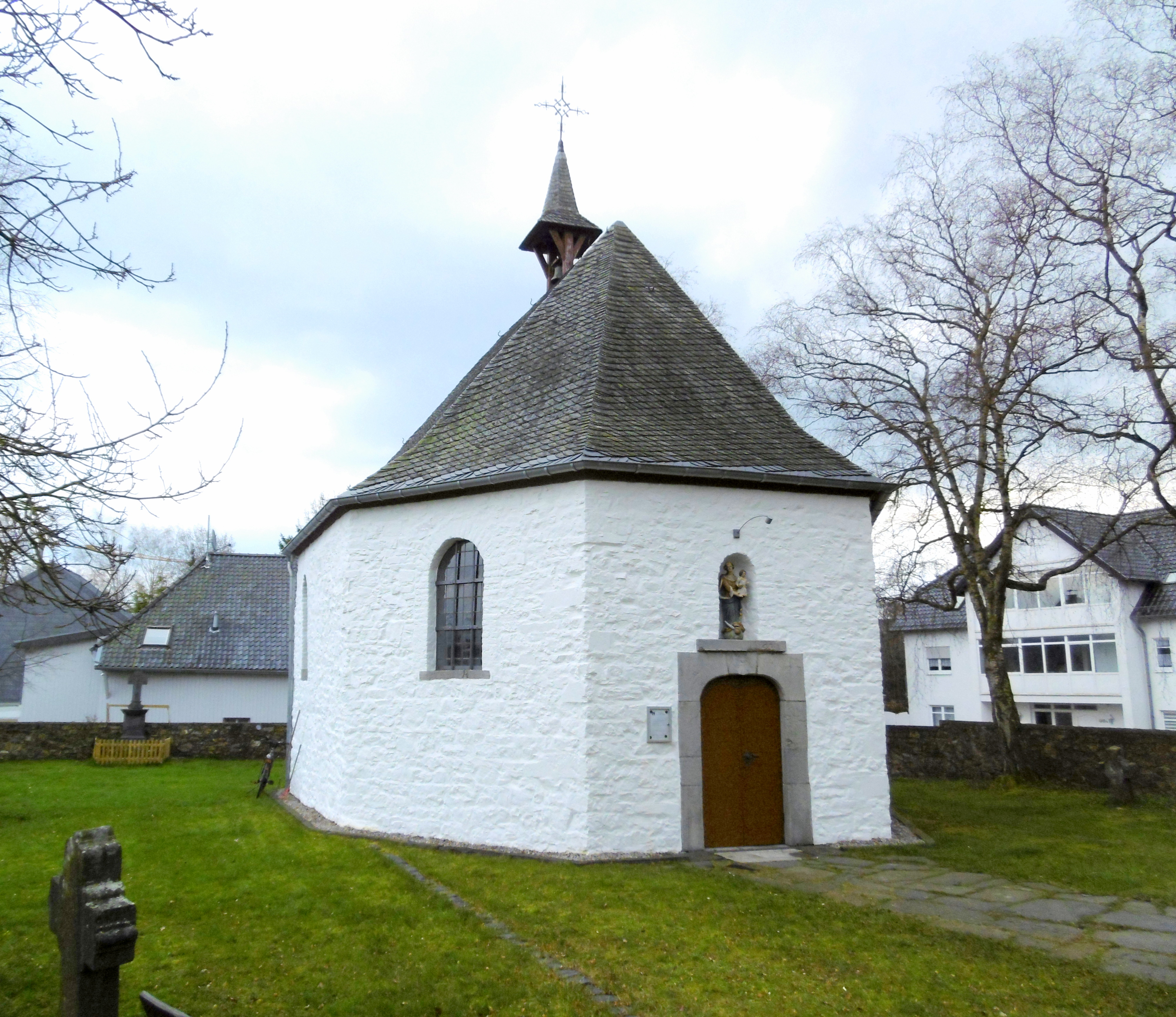 Marienkapelle Roetgen